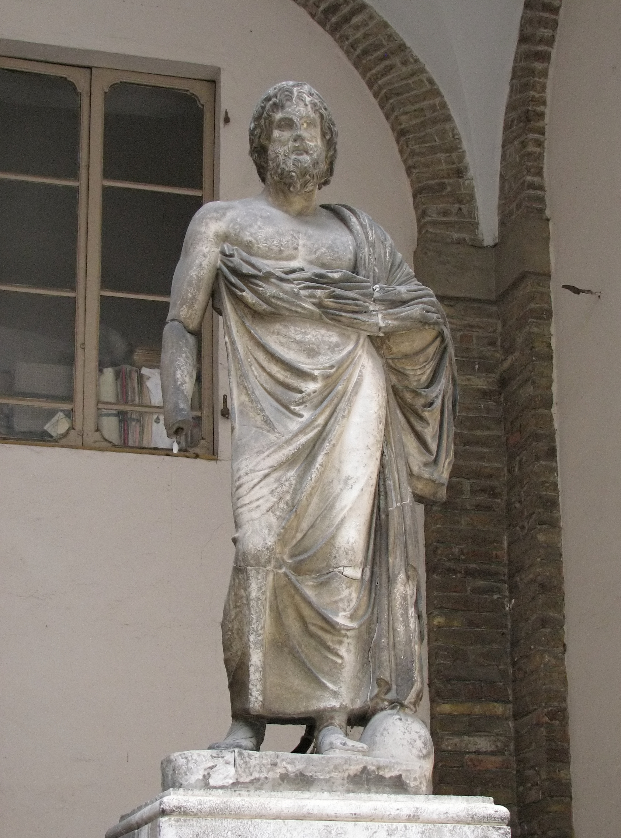 Statue of Asclepius from Urbisaglis, Palazzo del Comune a Macerata